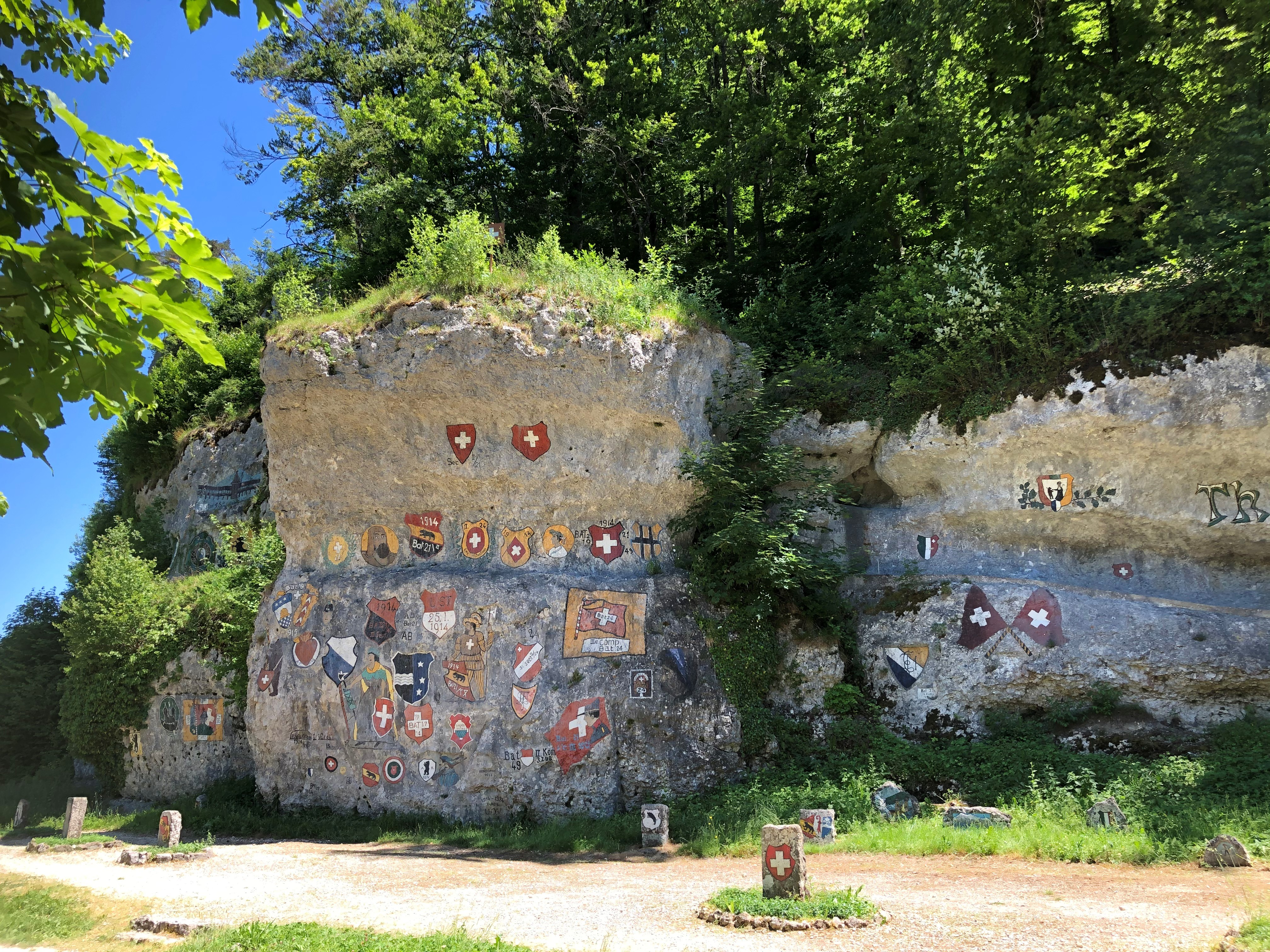 Wappenfelsanlage Chessiloch bei Grellingen BL am 1. Juni 2020